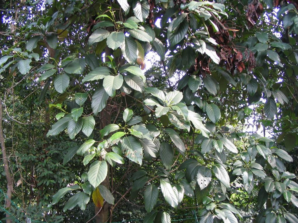 Baccaurea brevipes - Bukit nana national Park - Kuala Lumpur